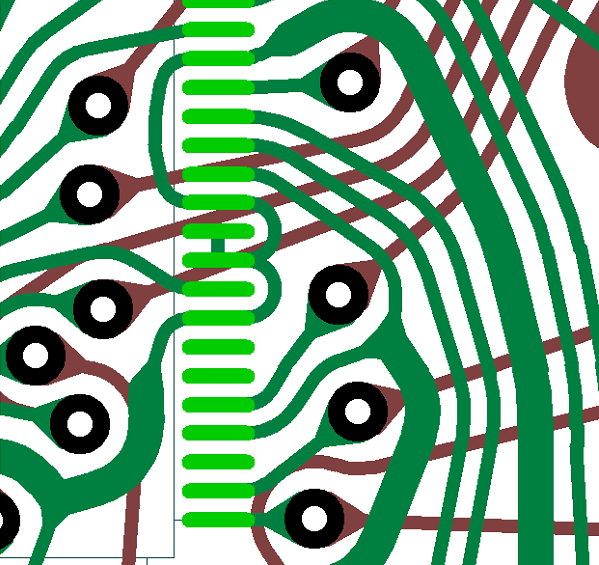 Сужение проводника при подходе к контактам в САПР TopoR